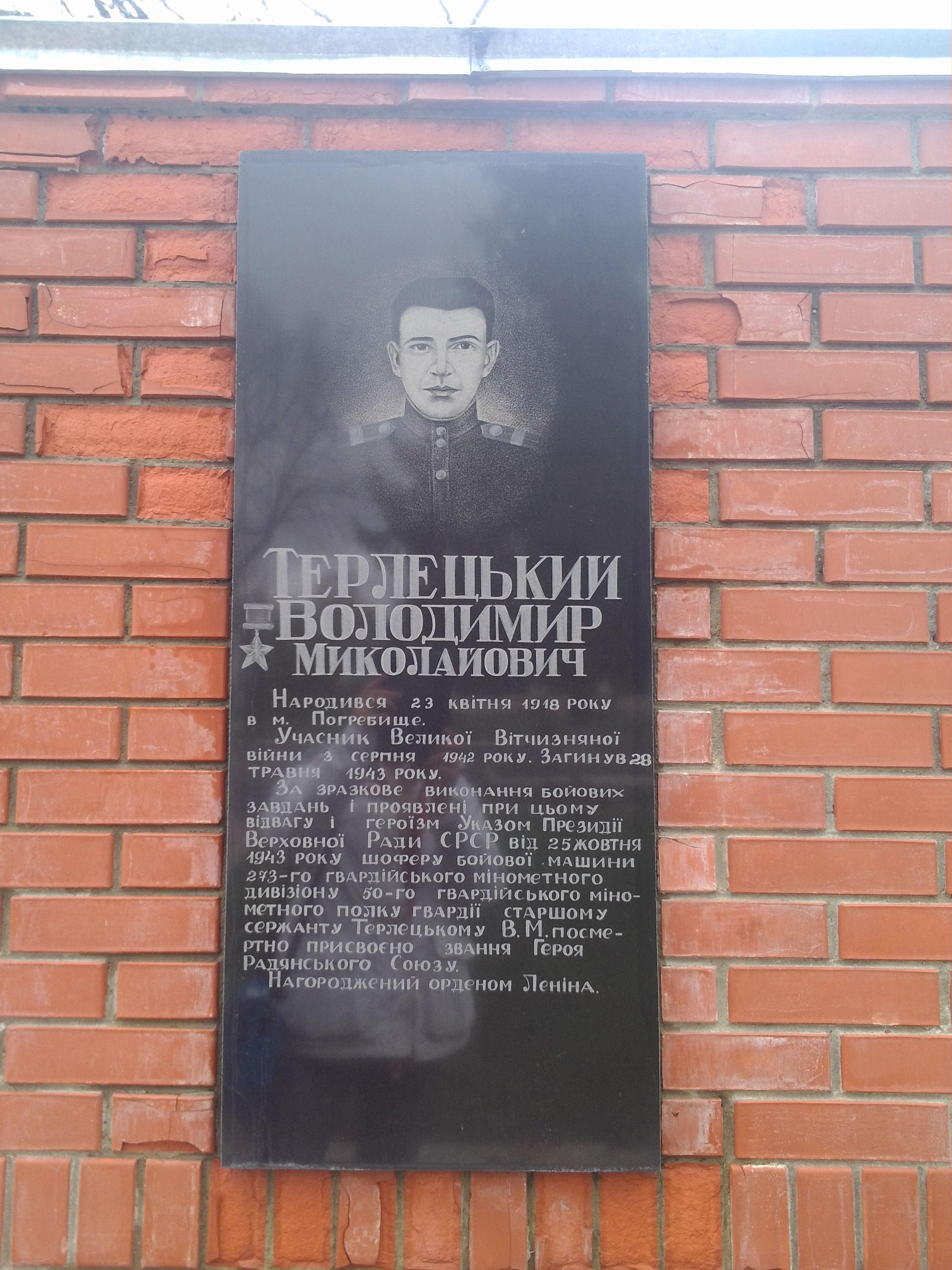 м. Погребище. Меморіал Героїв.